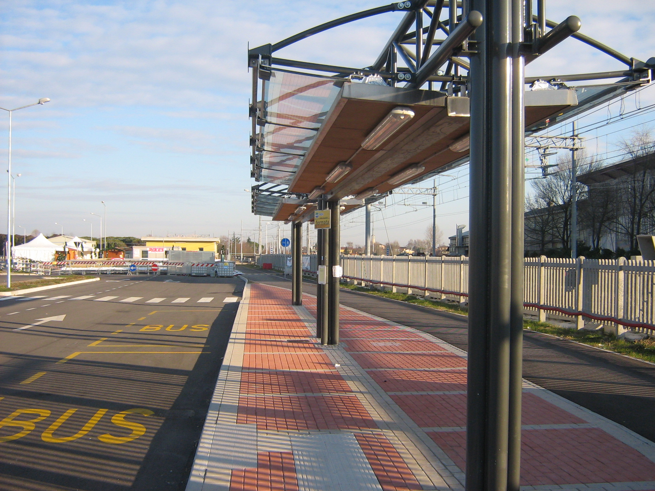 spinea fs